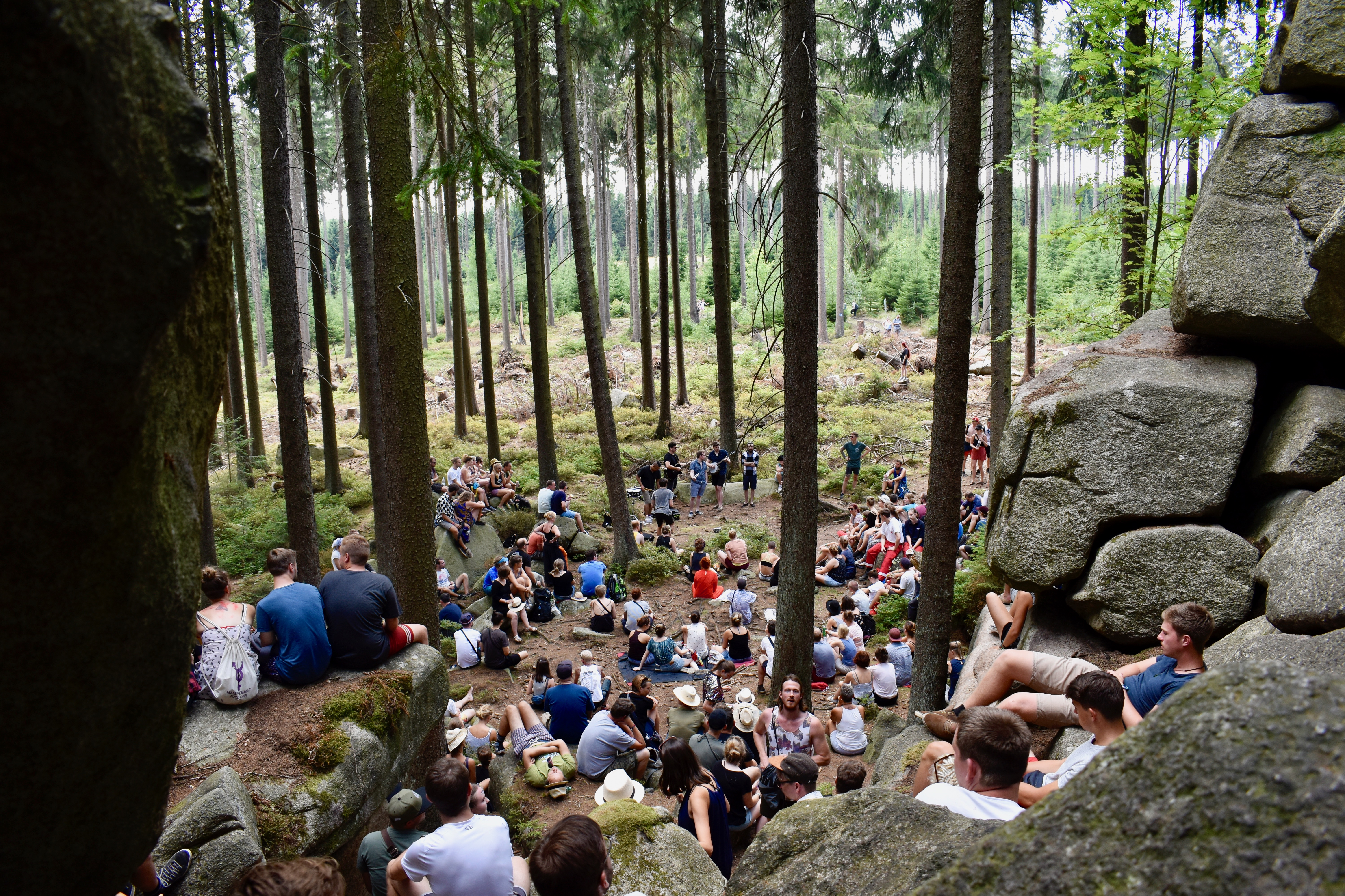 Akustikpfad Rocken am Brocken 2018. Station Steinwand